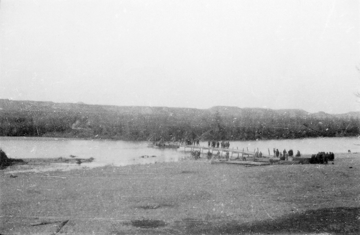 B/17. Seròs (Lérida). Puente en construcción sobre el rio Segre.